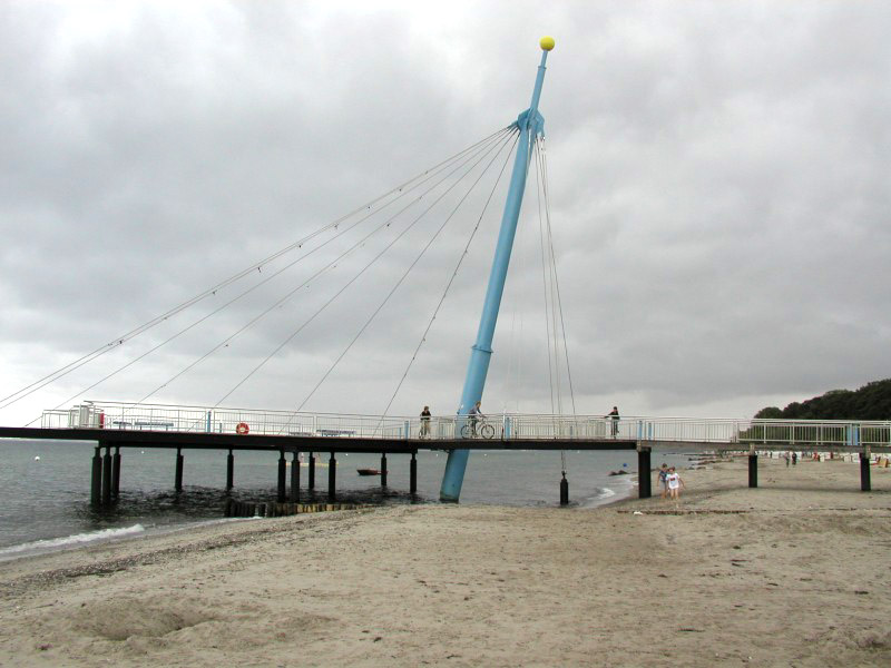 Foto der Seebruecke in Hohwacht, an der Ostsee. Foto selbst gemacht.